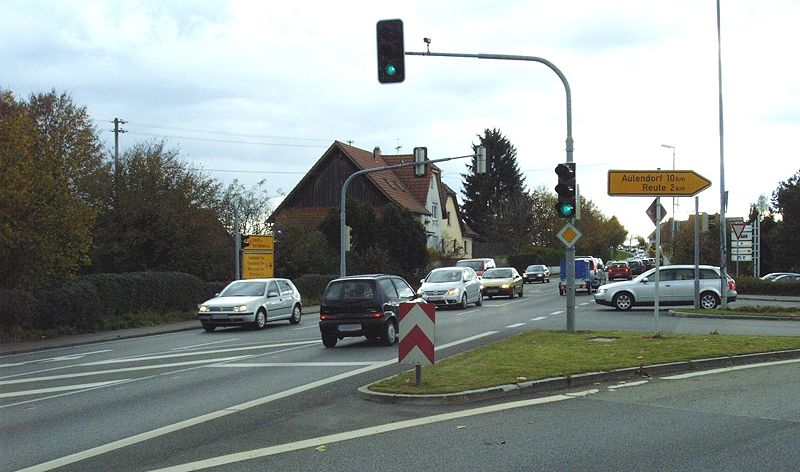 Bundesstraße 30 Ortsdurchfahrt Gaisbeuren in Fahrtrichtung Ravensburg, kurz vor dem Ortsausgang